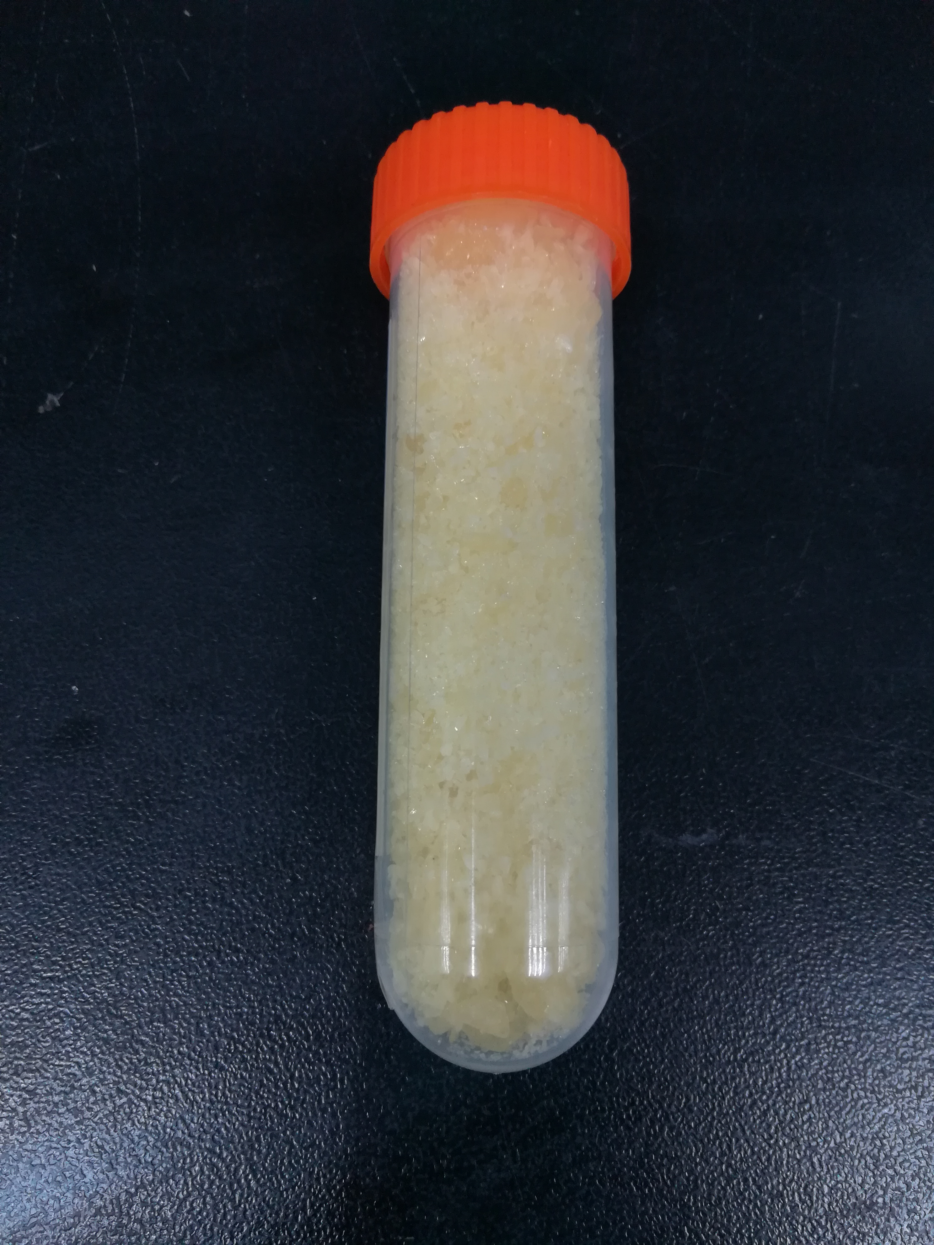 50g的硝酸钐